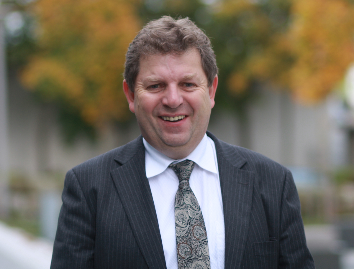 Terje Mjåtveit, mayor of Eigersund 2003-2011.